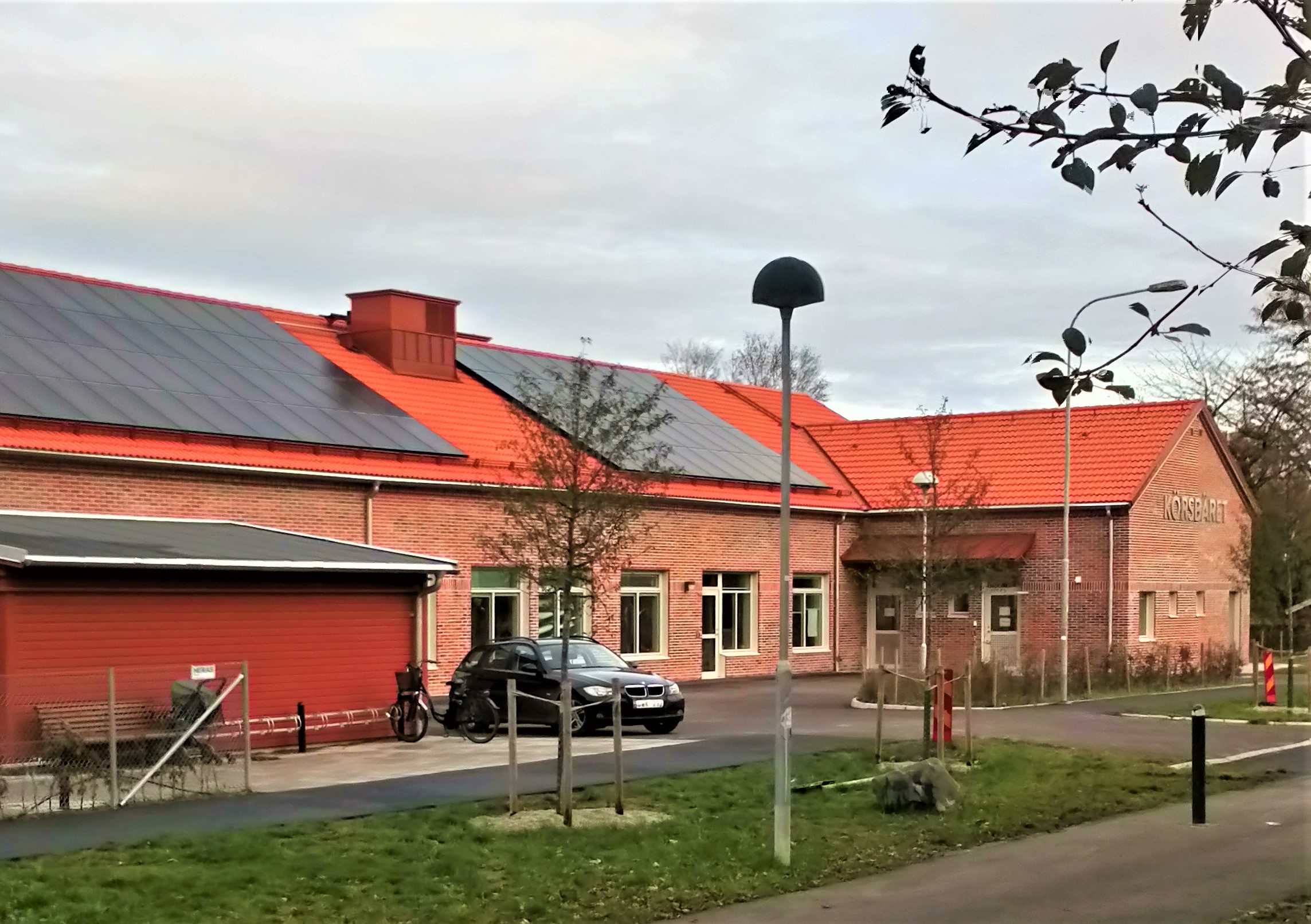 Förskolan Körsbäret den 7 november 2019